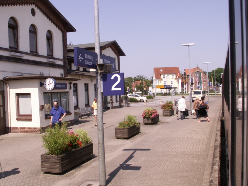 Bahnhof der Stadt Oldenburg in Holstein